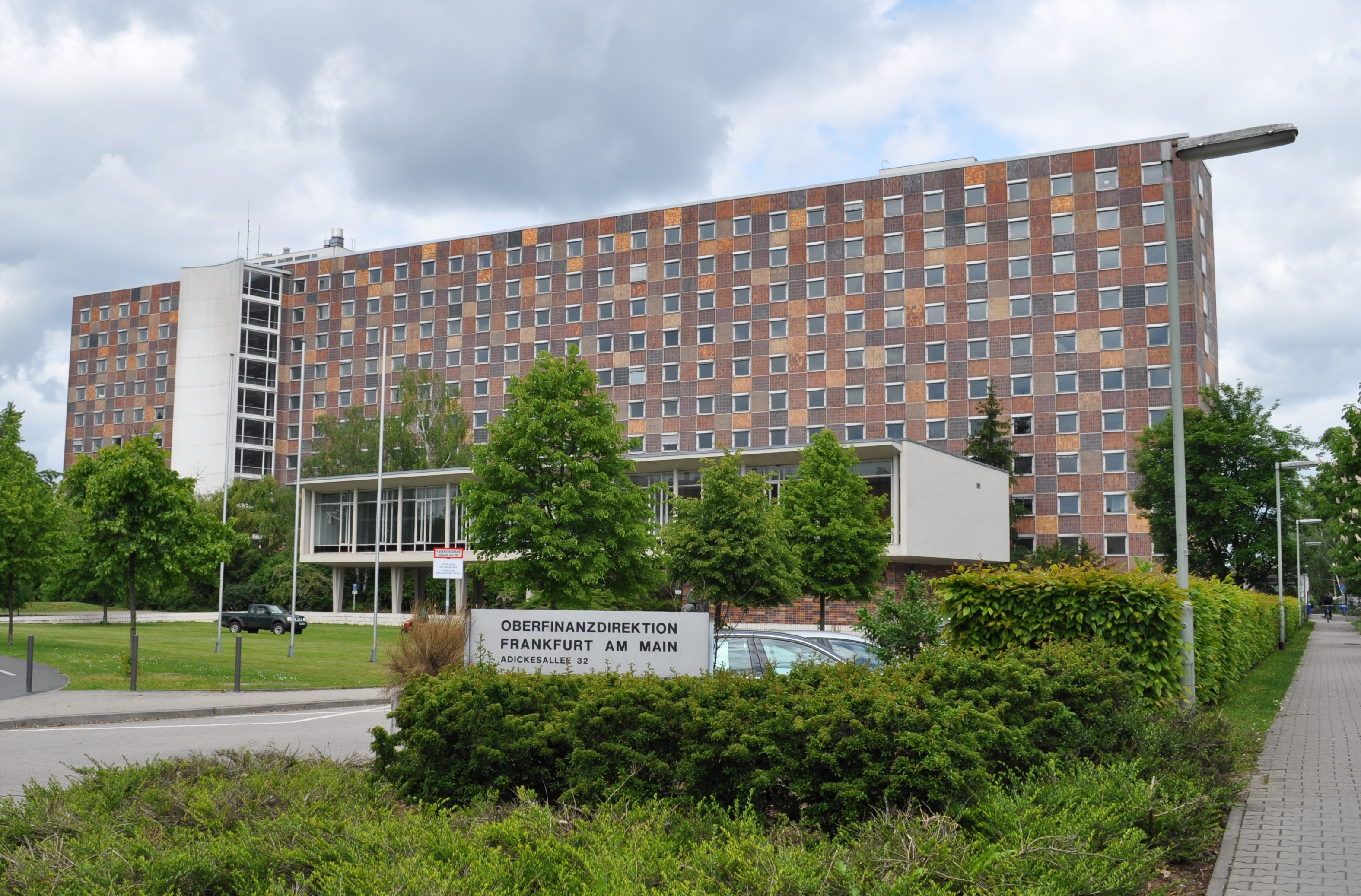 Ehemaliges Gebäude der Oberfinanzdirektion Frankfurt am Main von der Adickesallee aus fotografiert